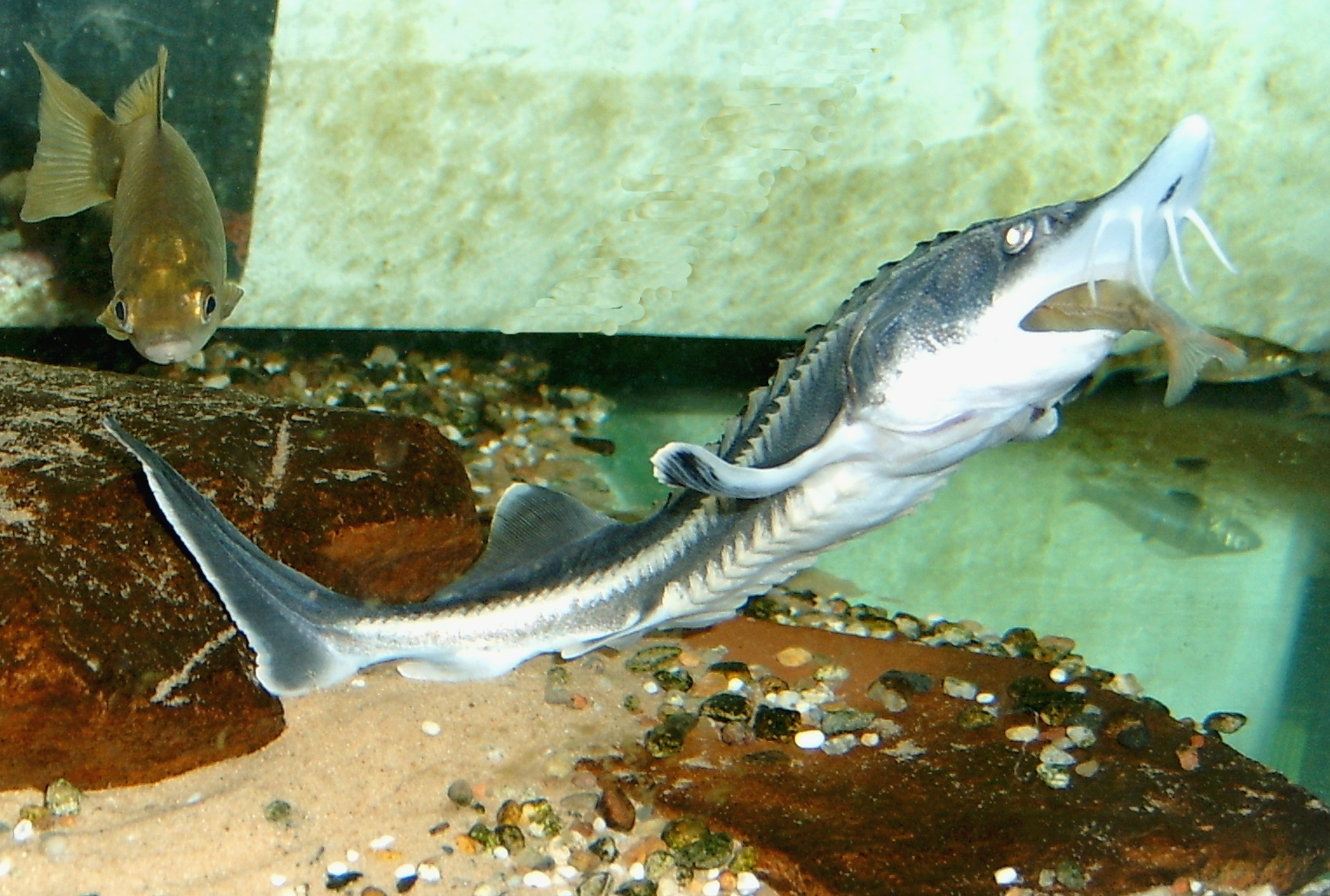 Europäischer Hausen (Huso huso) juvenil